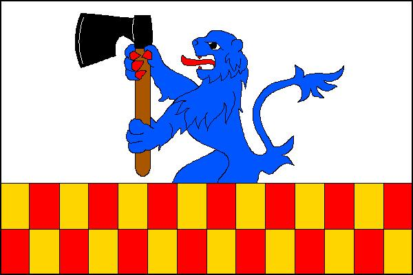 Vlajka obce Suchý